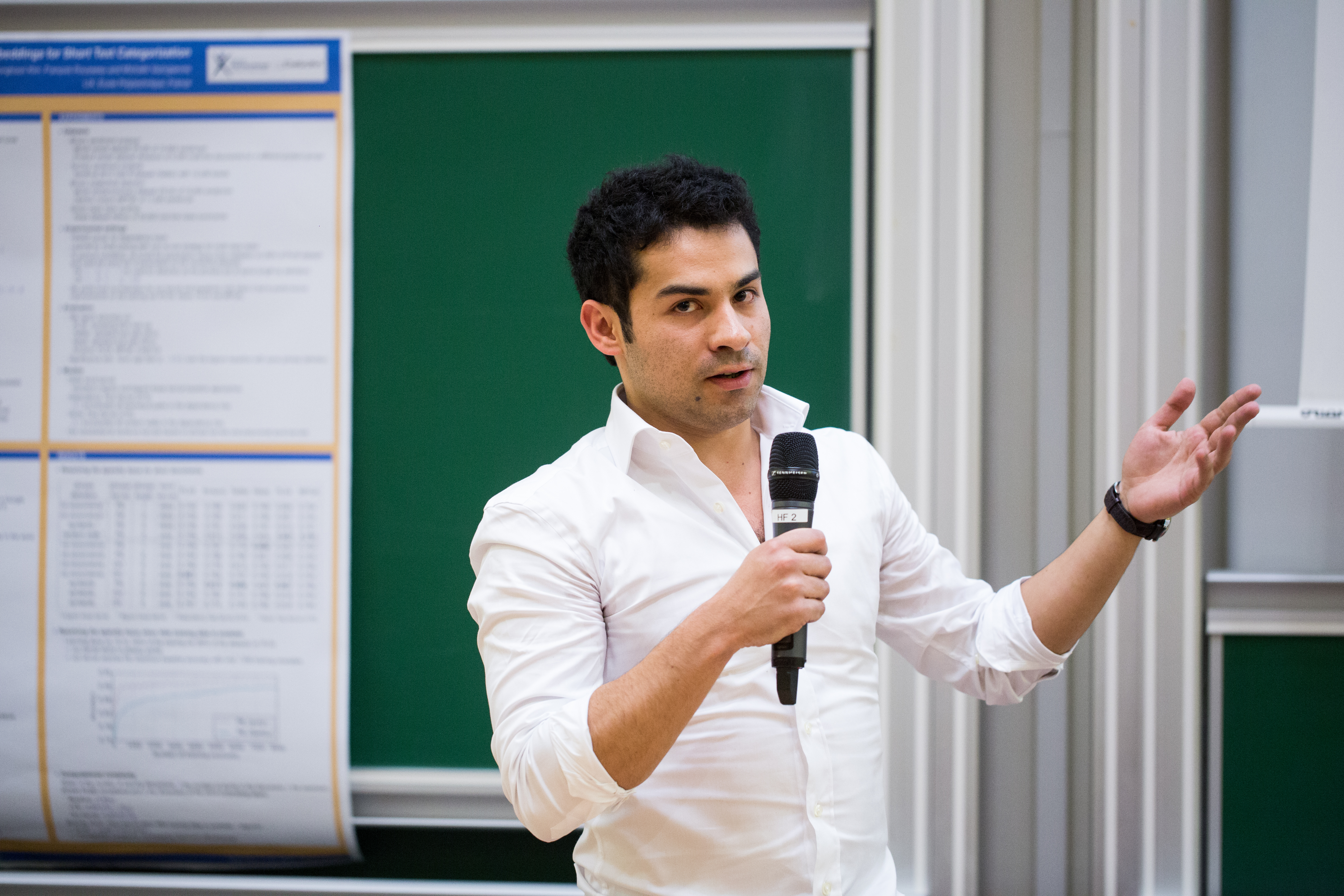 Joaquim Fernandez Tapia X 2006( webedia )